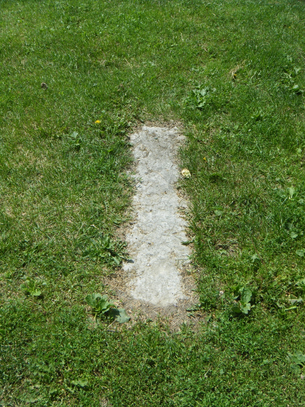 Fundament betonowej ławki stojącej od końca lat 40. XX wieku na skwerze przed płaskorzeźbą "Plon" (róg ul. Katowickiej i Zwycięzców w Warszawie).